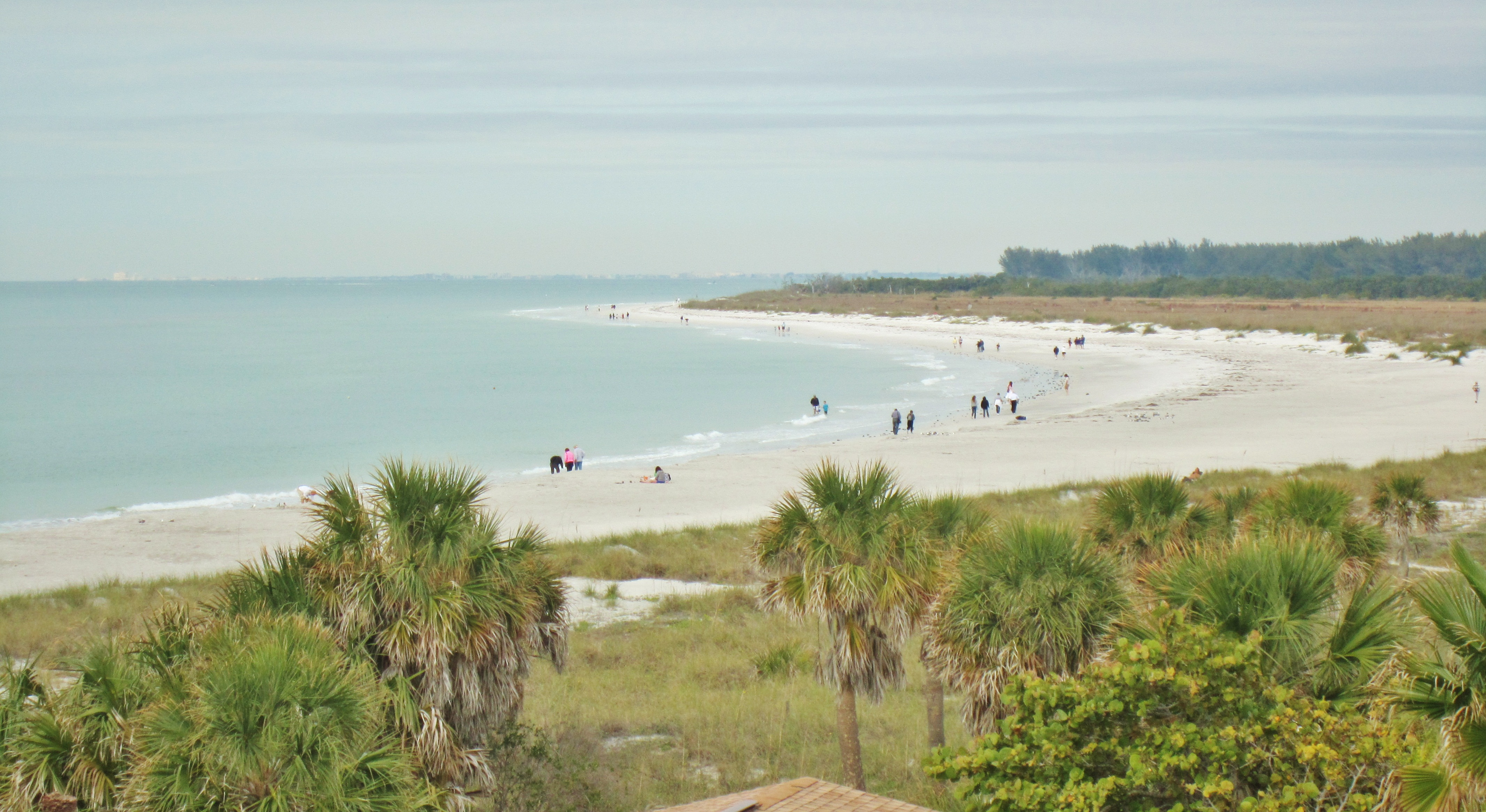 La Plage #1, Fort De Soto Park, Tierra Verde, Floride. #1 beach